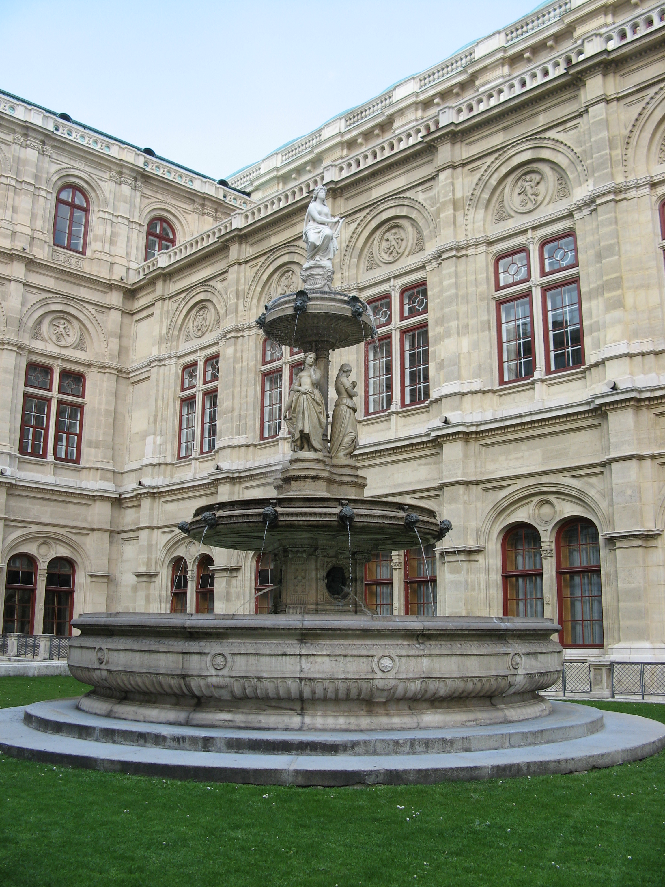 Opernbrunnen (1867-68) von Sicardsburg und van der Nüll, Operngasse, Wien-Innere Stadt